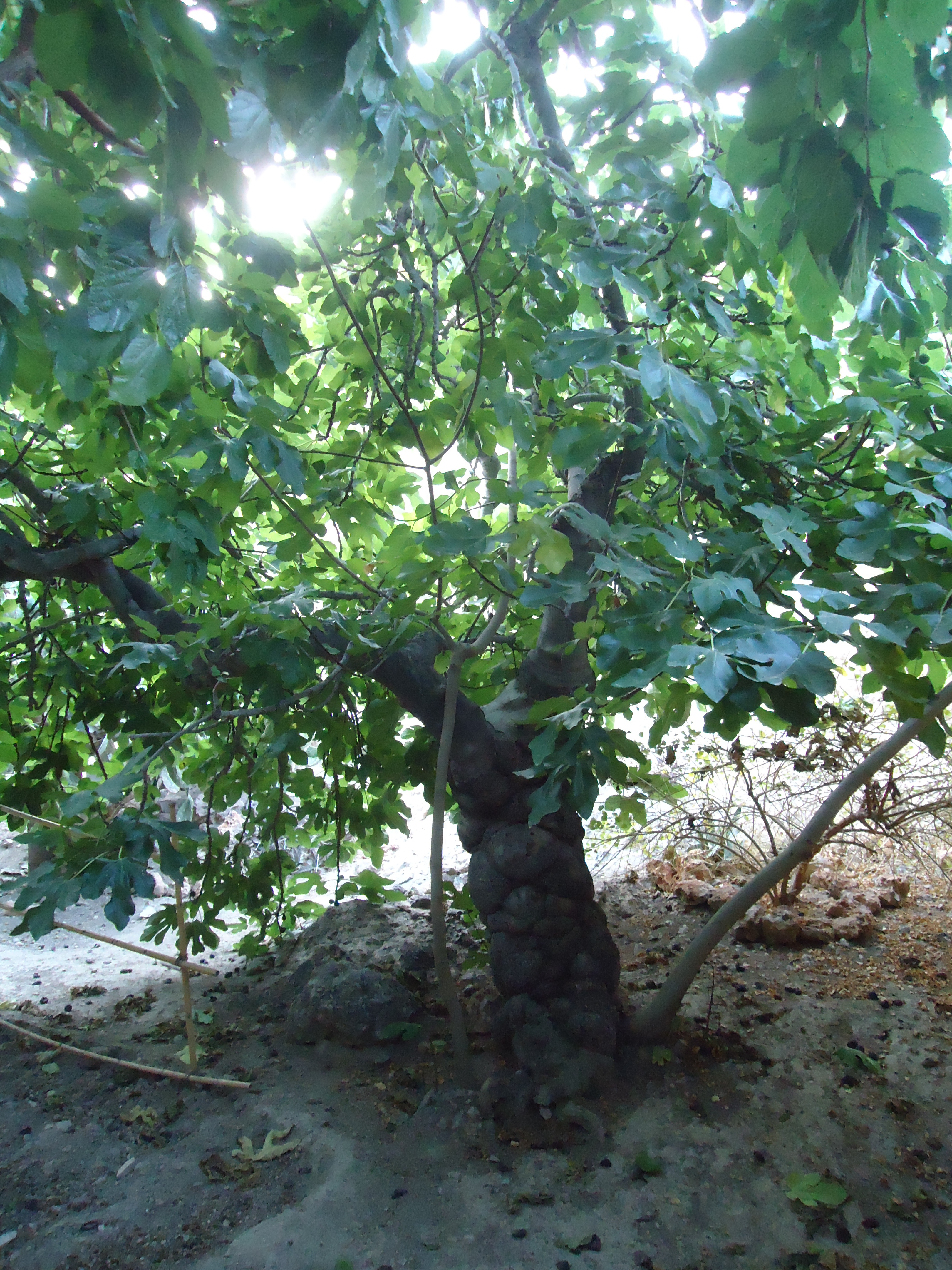 Higuera bajo la cual pasaba su tiempo Miguel Hernández, en su casa-museo de Orihuela (Comunidad Valenciana, España)